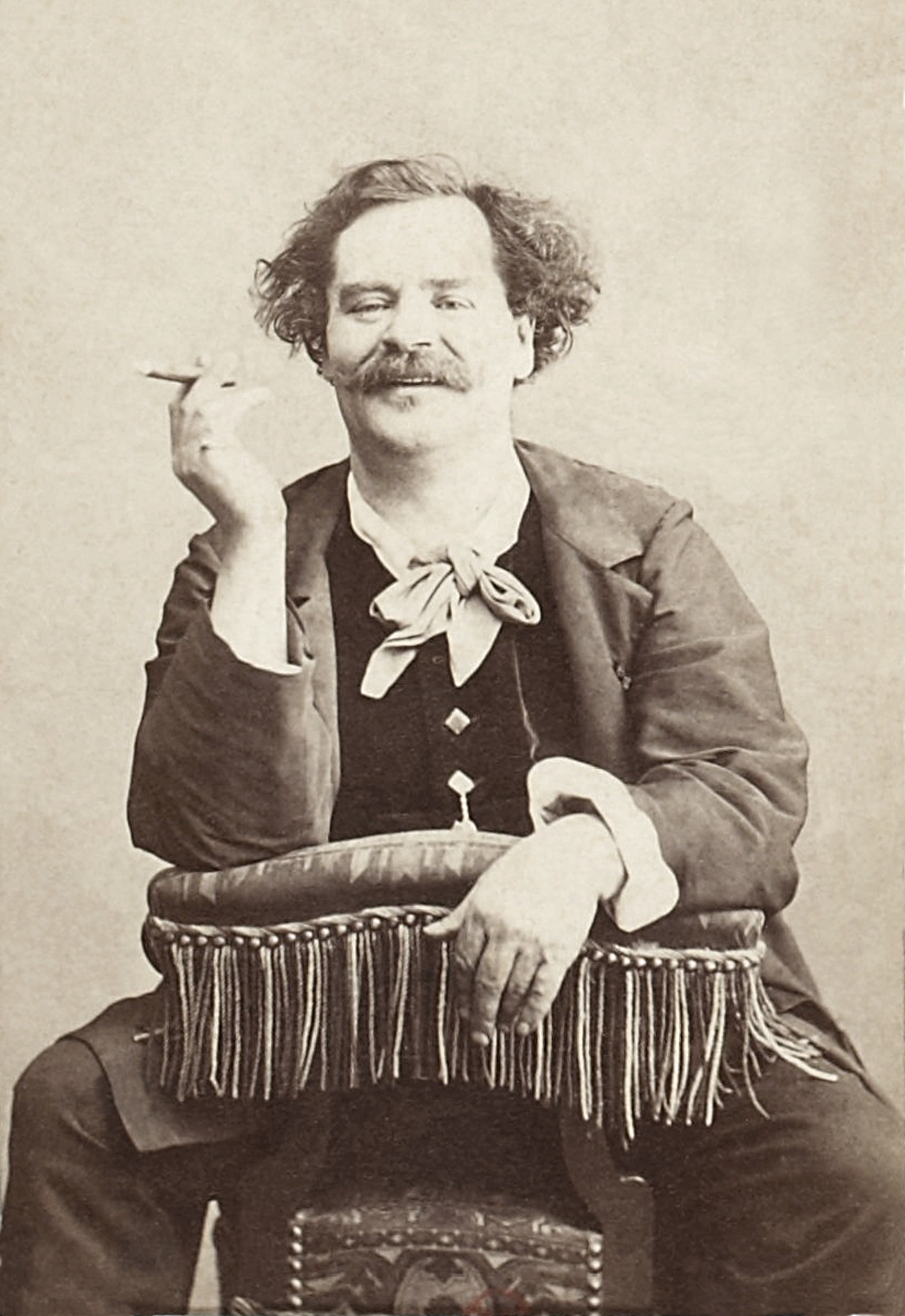 Timothée Trimm (Léo Lespès) (1815 - 1875), écrivain et journaliste français. Le siège qu'il enfourche est une chaise dite ponteuse, voyeuse, voyelle ou fumeuse. C'est une pièce de mobilier typique des styles Louis-Philippe et Second-Empire, destinée à jouer (ponter) autour d'une table (parfois l'accoudoir contient un coffret avec des jetons), à "voir" les joueurs, ou simplement à fumer (l'accoudoir contenant alors des ustensiles de fumeur). Elle est donc réellement destinée à être ainsi enfourchée.